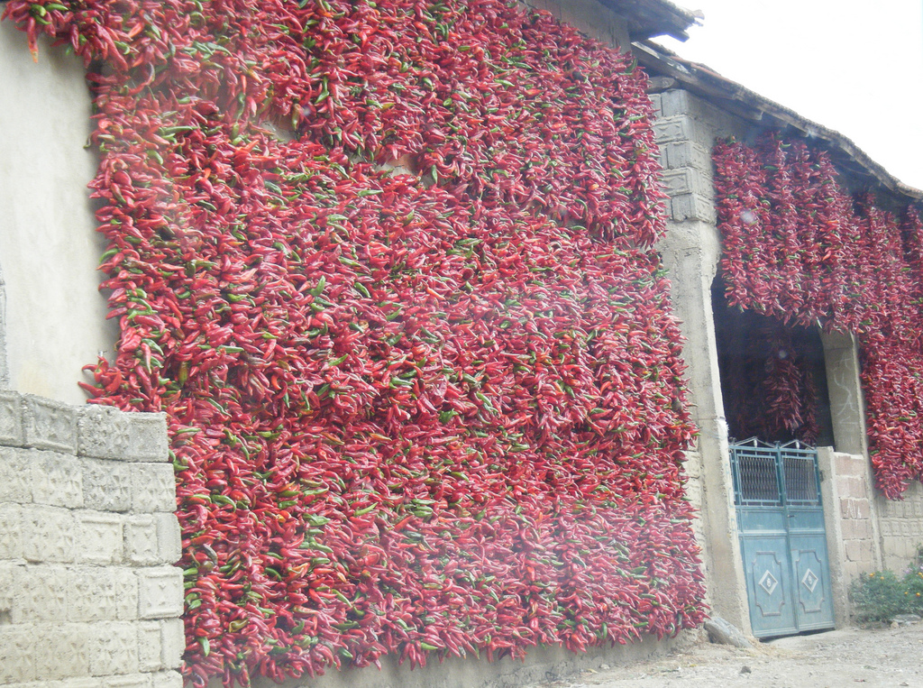 У селу су скоро све куће овако покривене паприком која се суши на сунцу, ради даље прераде - млевења, или употребе уцело у зимском периоду.